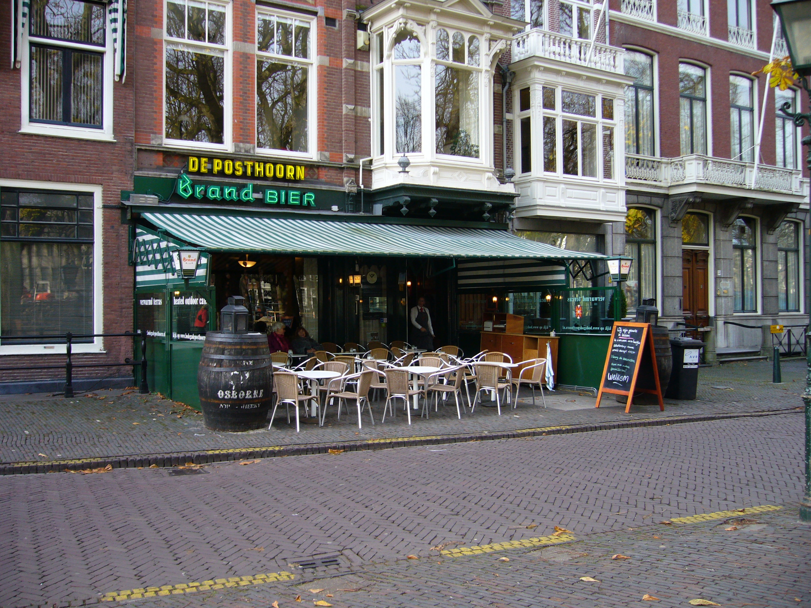 Bodega De Posthoorn op het Lange Voorhout, Den Haag